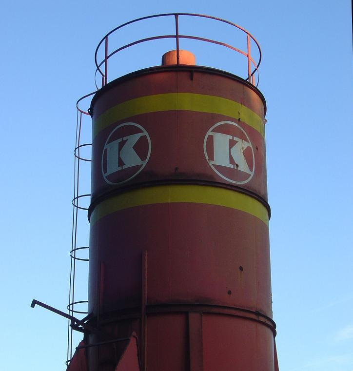 Silo mit altem Kapsreiter-Firmenlogo, Schärding